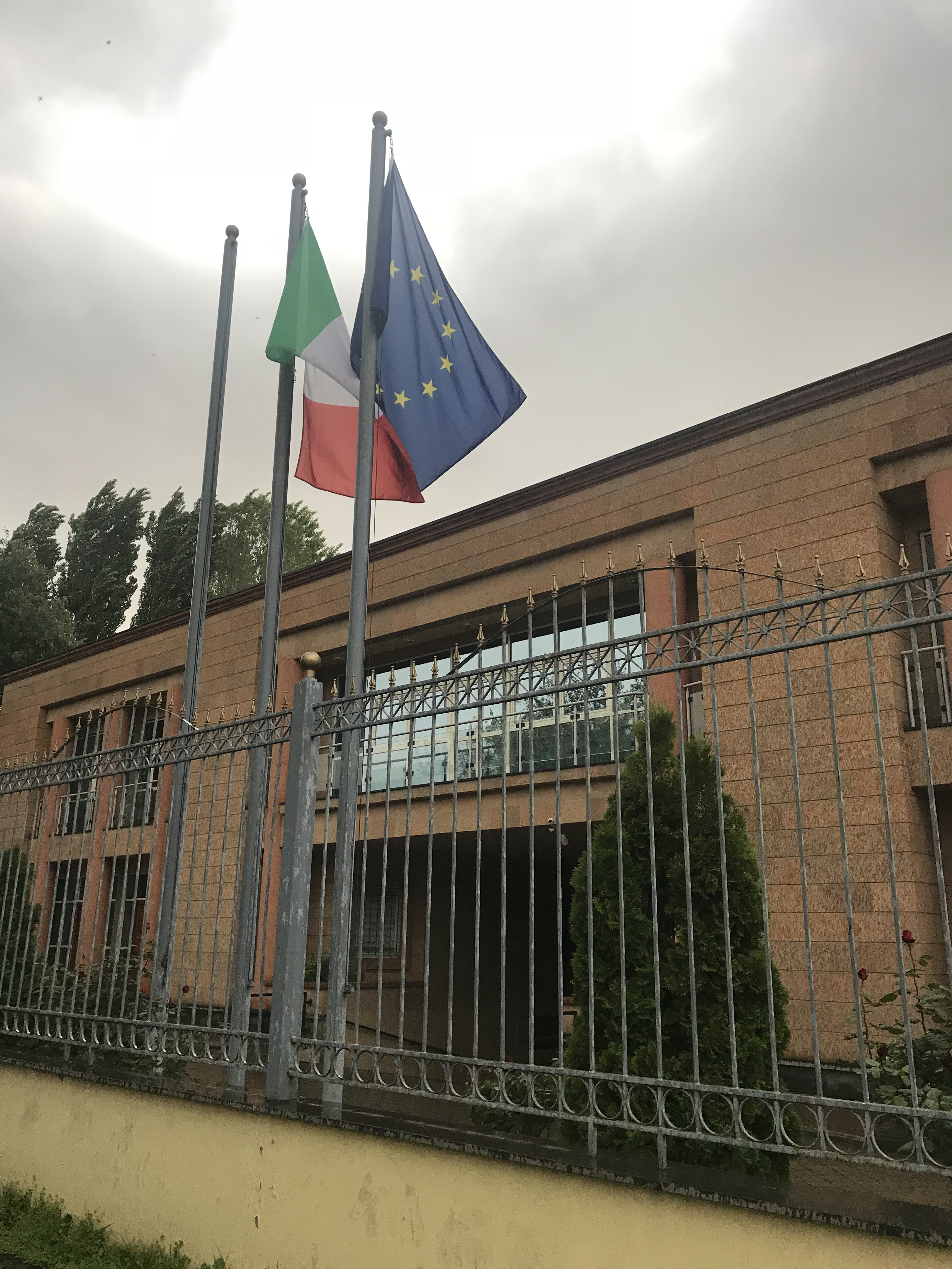 Vue de l'ambassade d'Italie à Erevan.